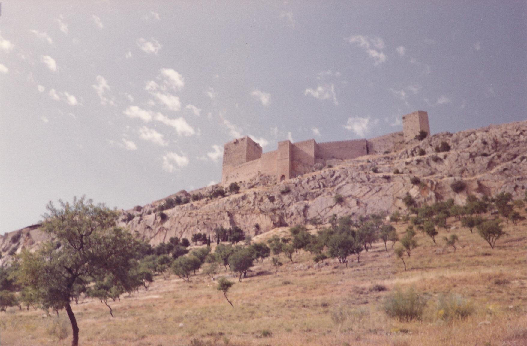 Castillo De Santa Catalina (Parador Nacional) Datum: 09/1984 Urheber: Michael Pfeiffer Quelle: privates Fotoalbum des Urhebers